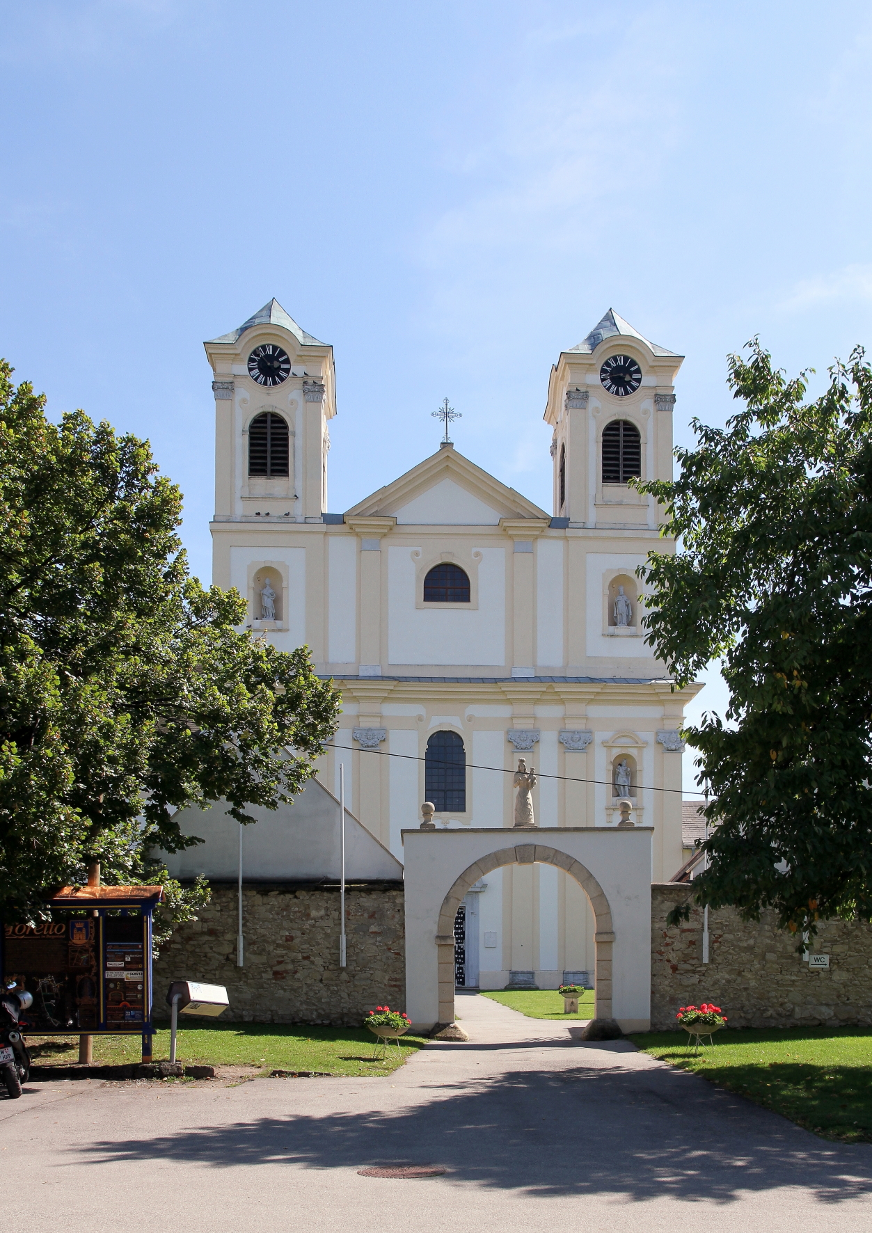 Die Basilika in der burgenländischen Marktgemeinde Loretto.